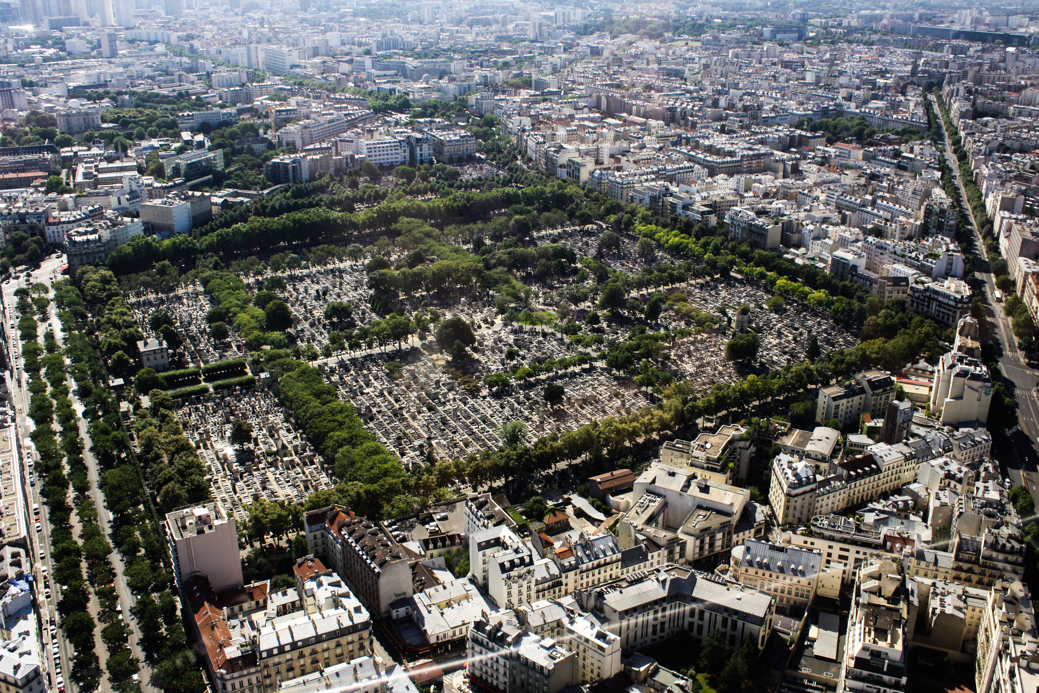 Montparnasse